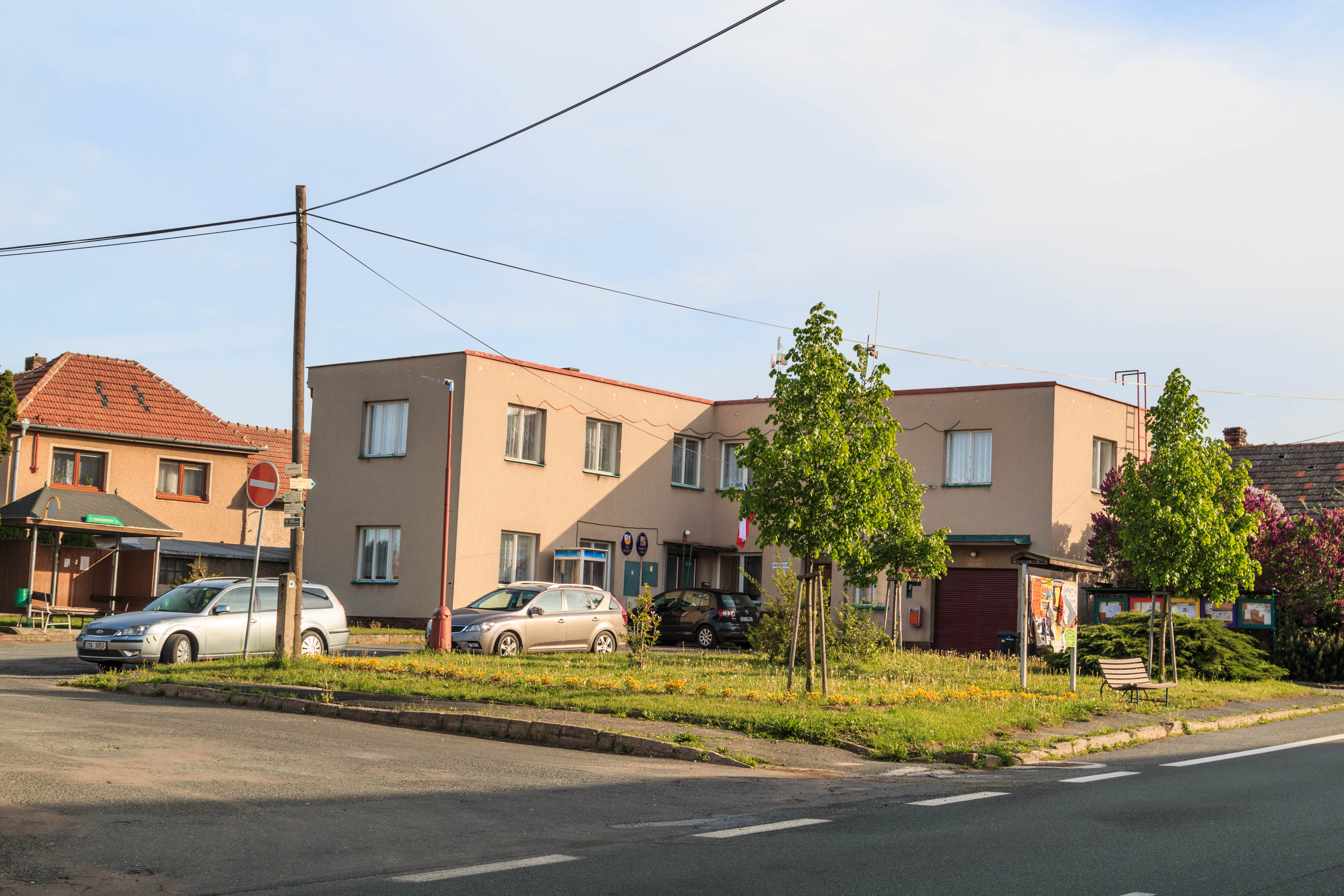 Bernardov obecní úřad